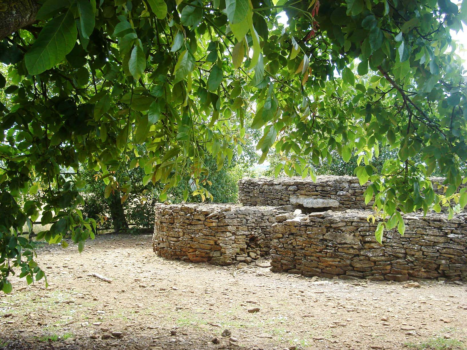 Dolmen à couloir dit « Ciste des Cous » à Bazoges-en-Pareds (85). .